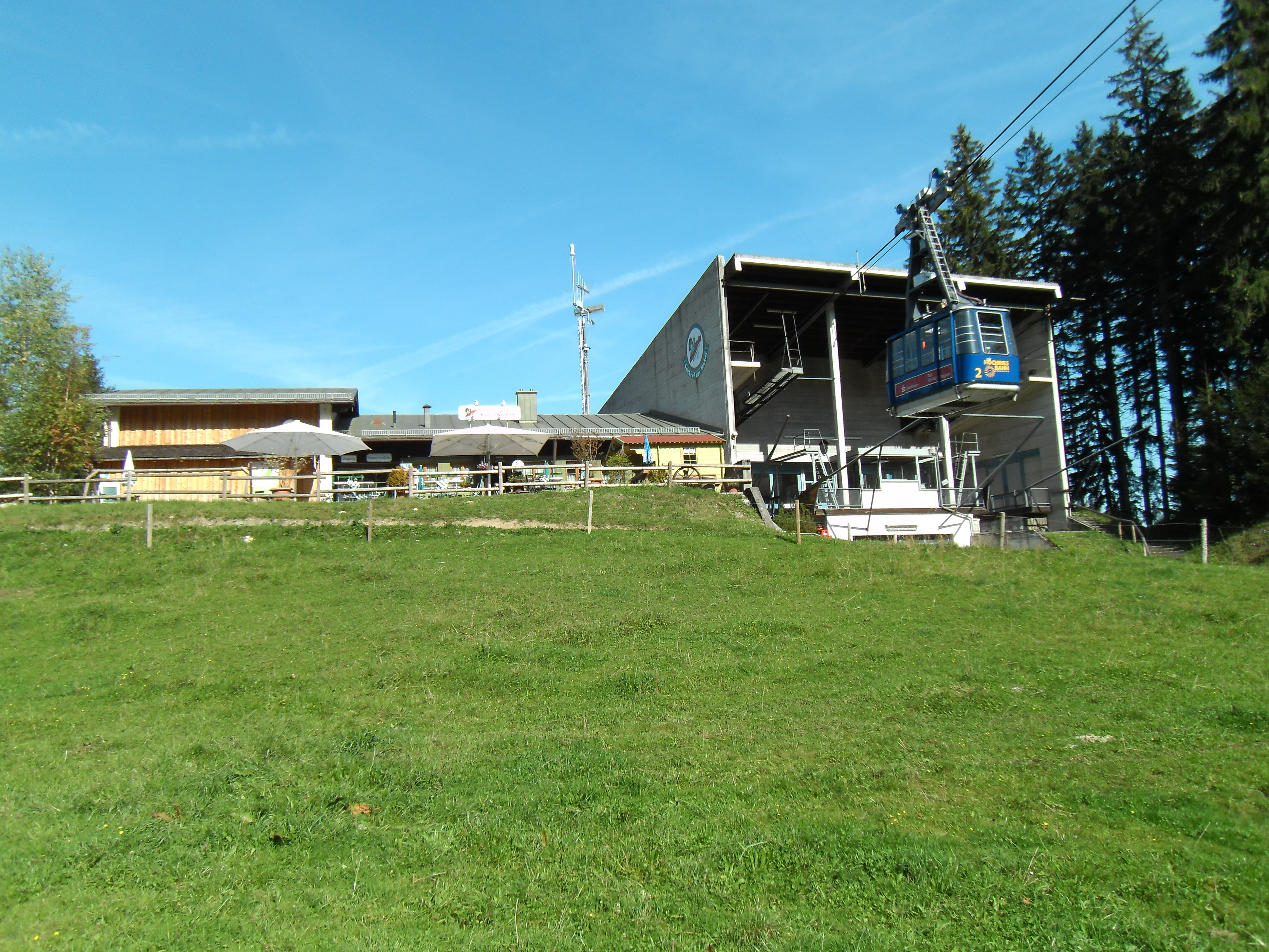 Gemeinde Samerberg, Ortsteil Grainbach. Ausgangspunkt der Hochries-Kabinenbahn an der Mittelstation, der von der Talstation in Grainbach aus mit einem Sessellift erreicht werden kann. Neben dem Bahngebäude befindet sich eine Gaststätte mit einer Terrasse.